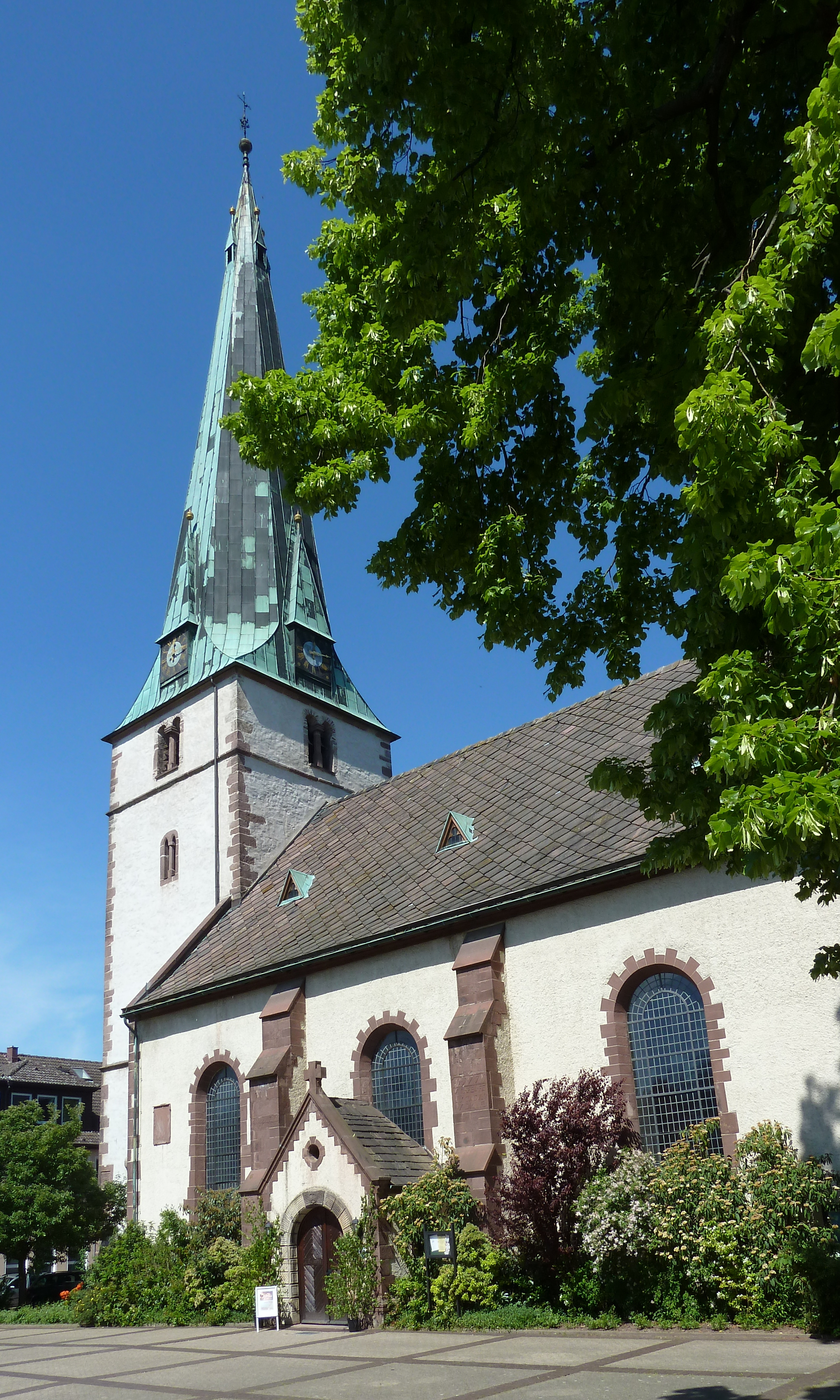 Ev.-luth. Lutherkirche in Holzminden, Niedersachsen